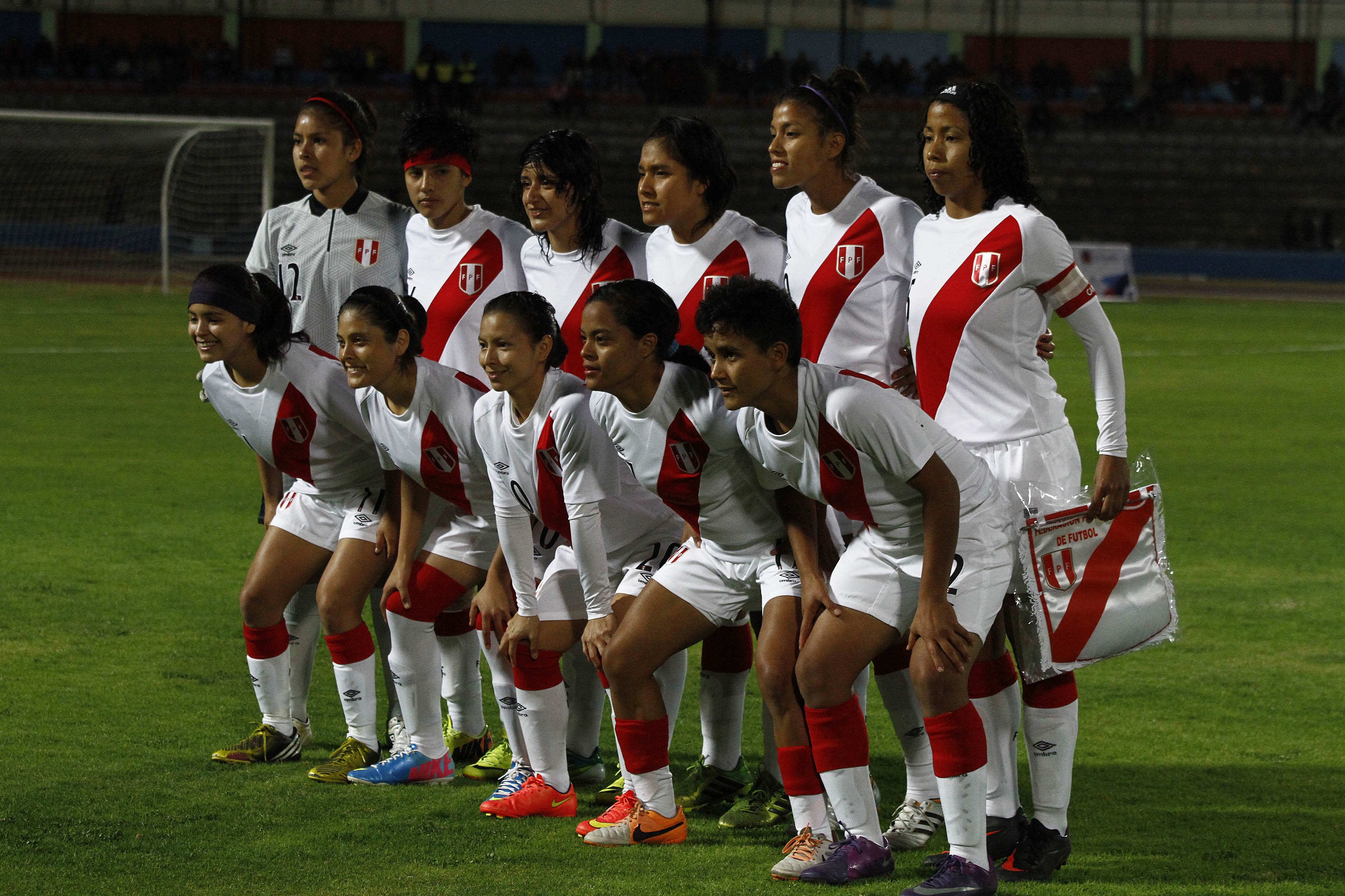 Riobamba (Chimborazo), 11 sep (Andes).- En el estadio Olimpico de la ciudad de Riobamba se jugó el primer partido de la selección ecuatoriana frente a la selección de Perúp en el campeonato Copa América Femenina de Fútbol Ecuador 2014. Foto: Micaela Ayala V./Andes